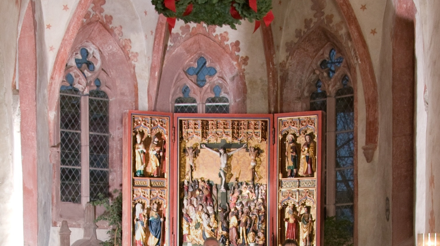 Göttingen-Nikolausberg, St. Nikolaus, Chor, Altarretabel